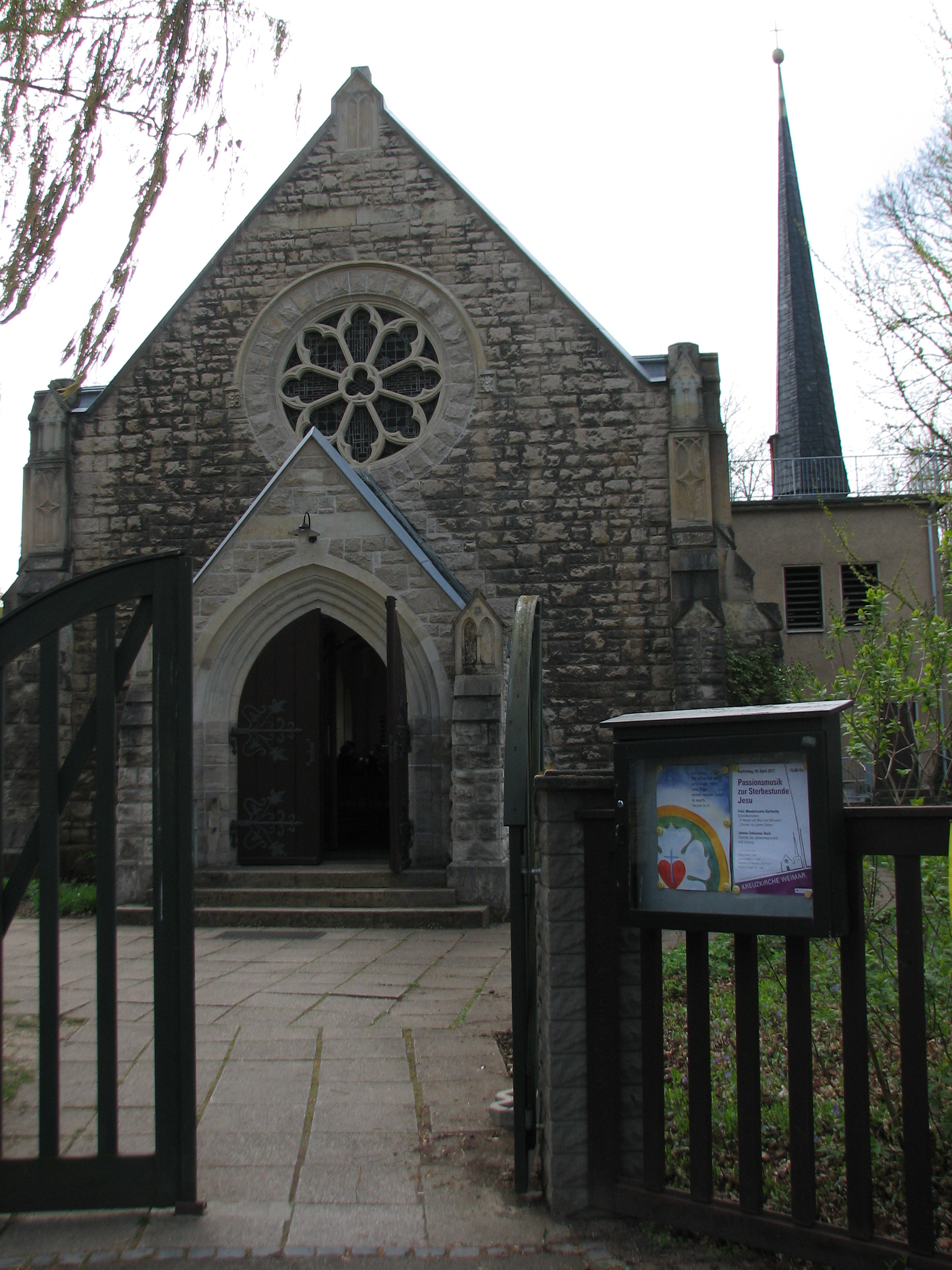 Blick zur Kreuzkirche in Weimar vom Eingang Ecke Shakespearestraße und Böhlaustraße